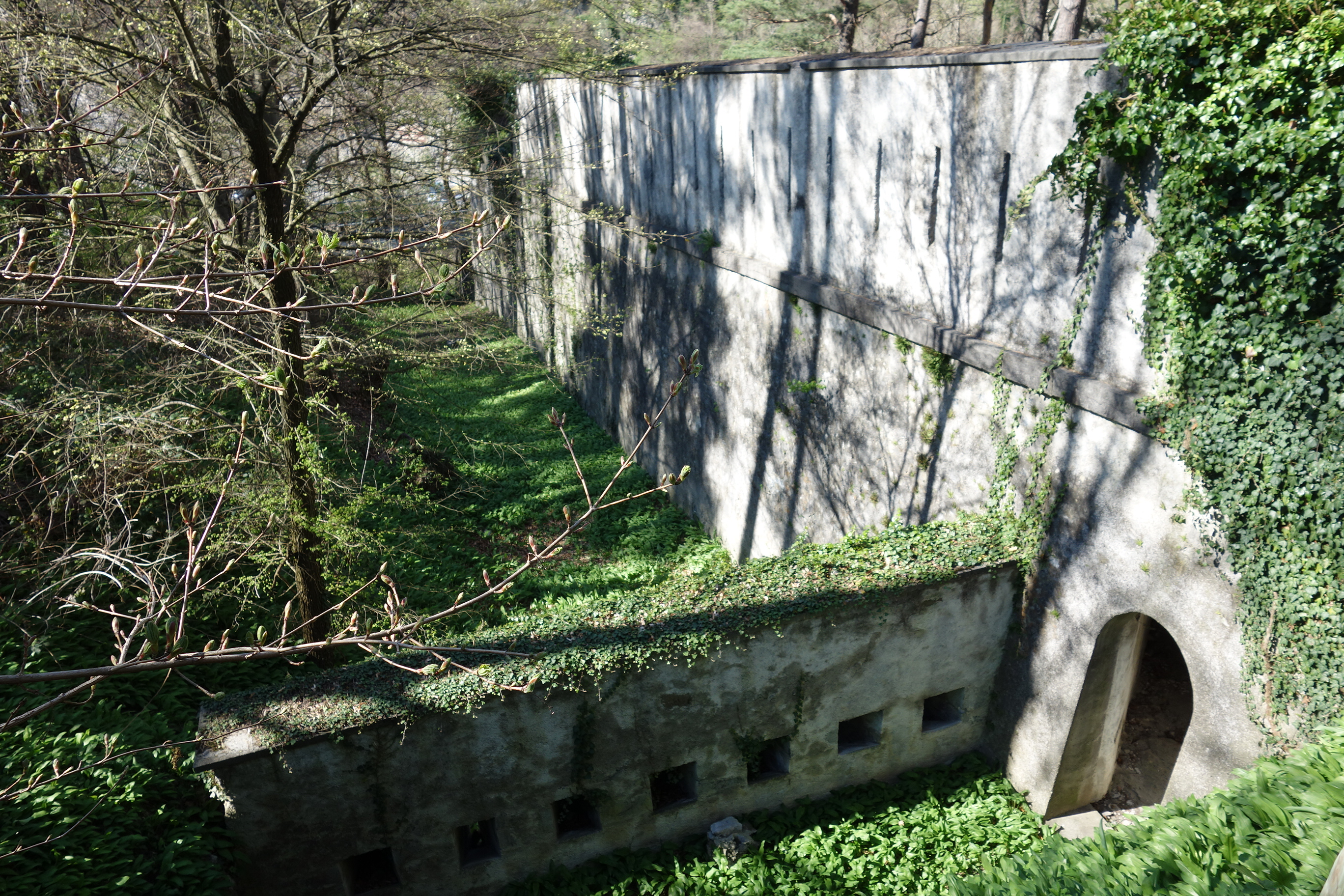 Dufourbefestigungen Saint-Maurice VS, Schweiz